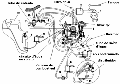 Braziliam Tempra Carburetor